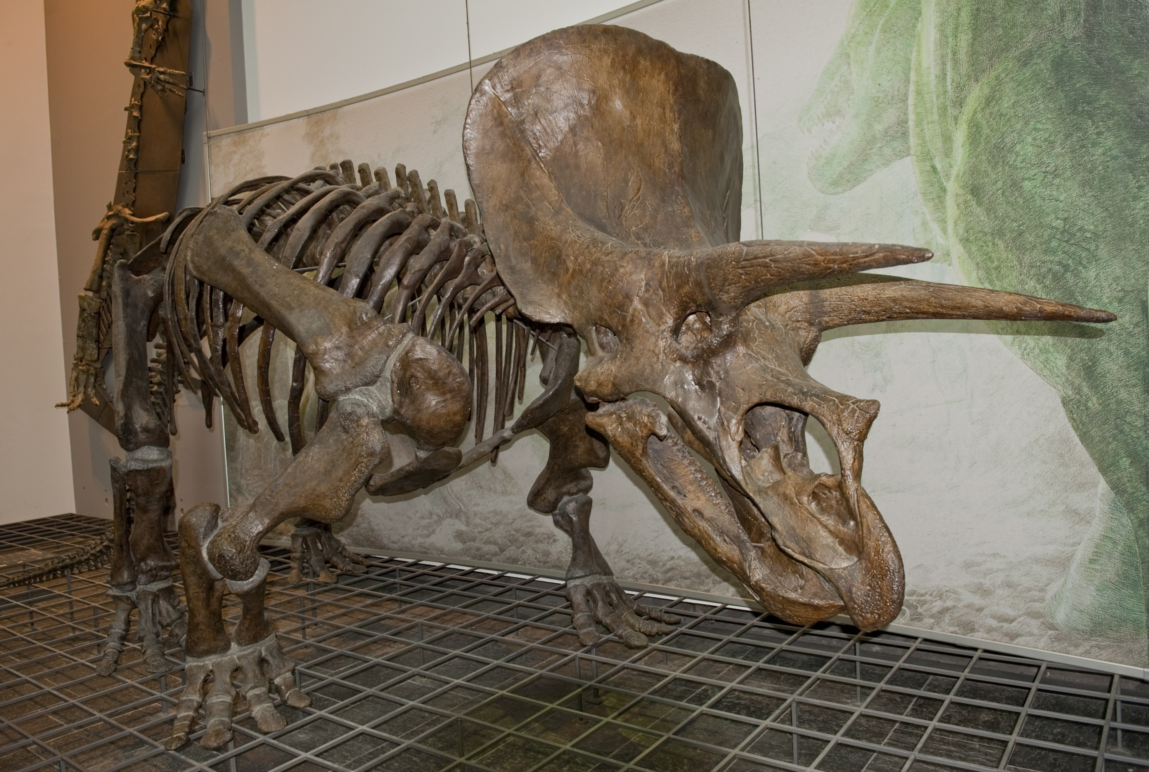 Triceratops (Senckenberg Naturmuseum, Frankfurt, Germany)